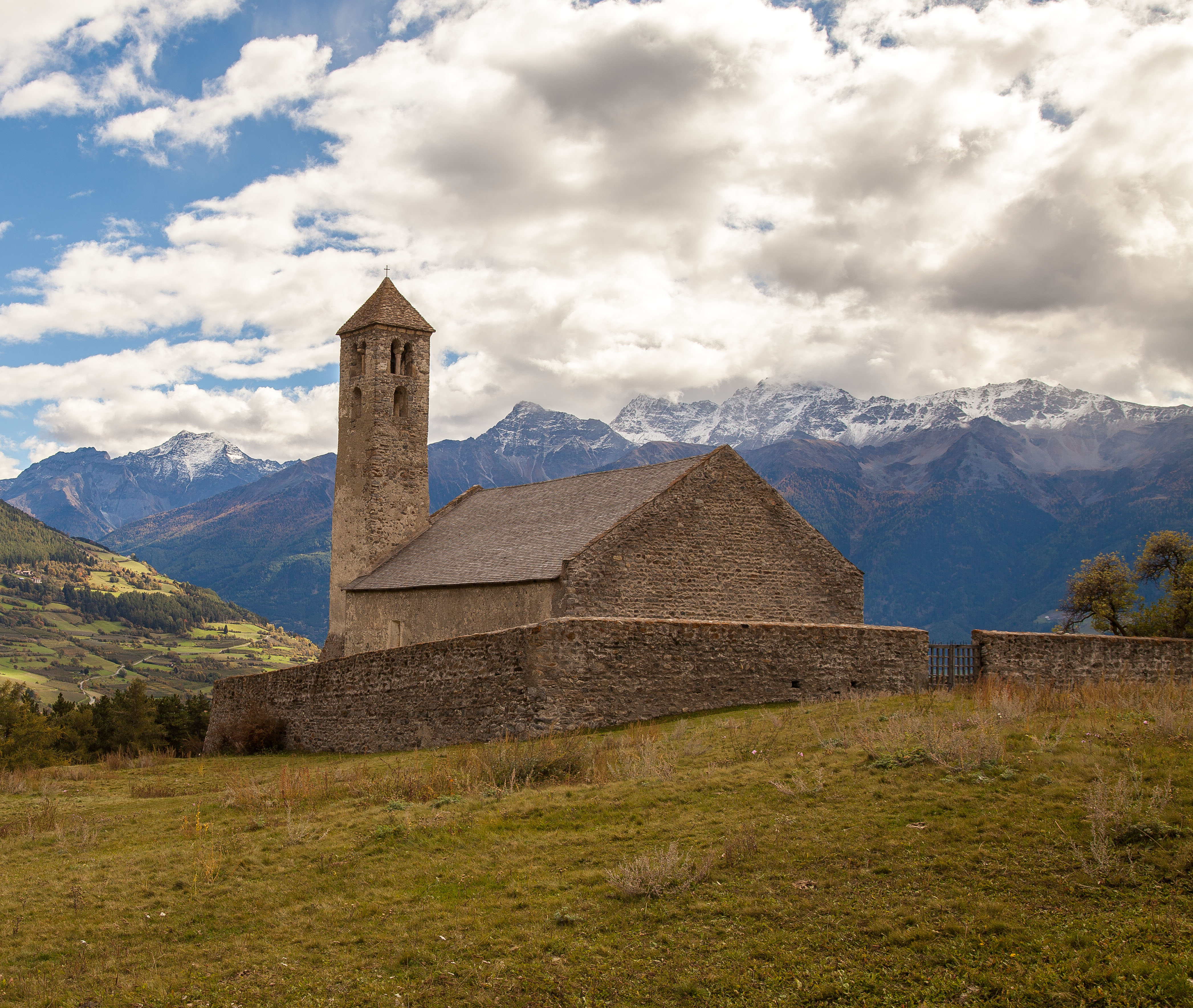 Kirchlein St. Veit auf dem Tartscher Bühel